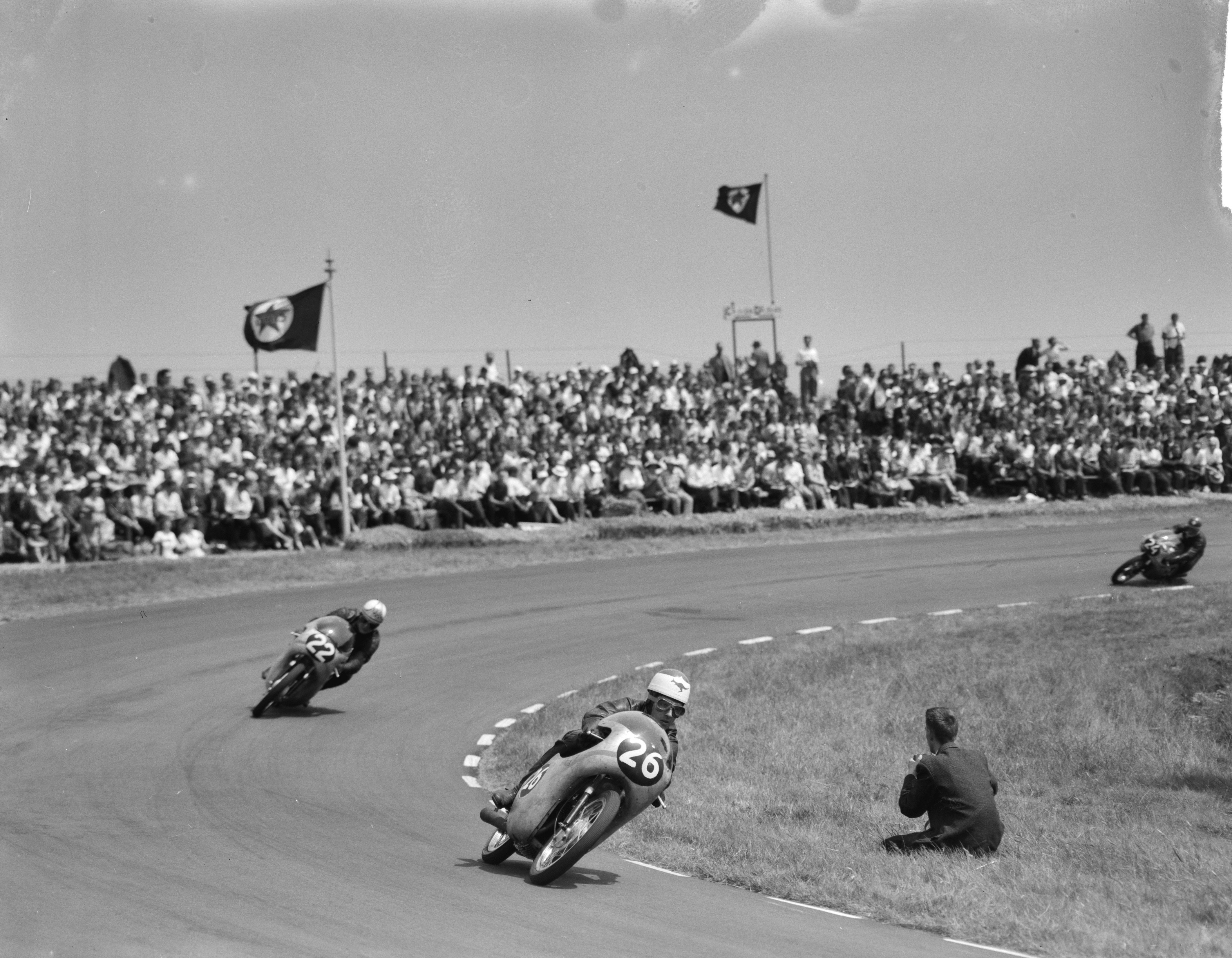 Collectie / Archief : Fotocollectie Anefo Reportage / Serie : TT Assen 1961 Beschrijving : 125cc race. Nummer 26 Tom Phillis op Honda en nummer 22 Mike Hailwood op Honda Datum : 24 juni 1961 Locatie : Assen Trefwoorden : RACES, motorsport Persoonsnaam : Hailwood, Mike, Phillis, Tom Instellingsnaam : TT Fotograaf : Bilsen, Joop van / Anefo Auteursrechthebbende : Nationaal Archief Materiaalsoort : Negatief (zwart/wit) Nummer archiefinventaris : bekijk toegang 2.24.01.04 Bestanddeelnummer : 912-6407